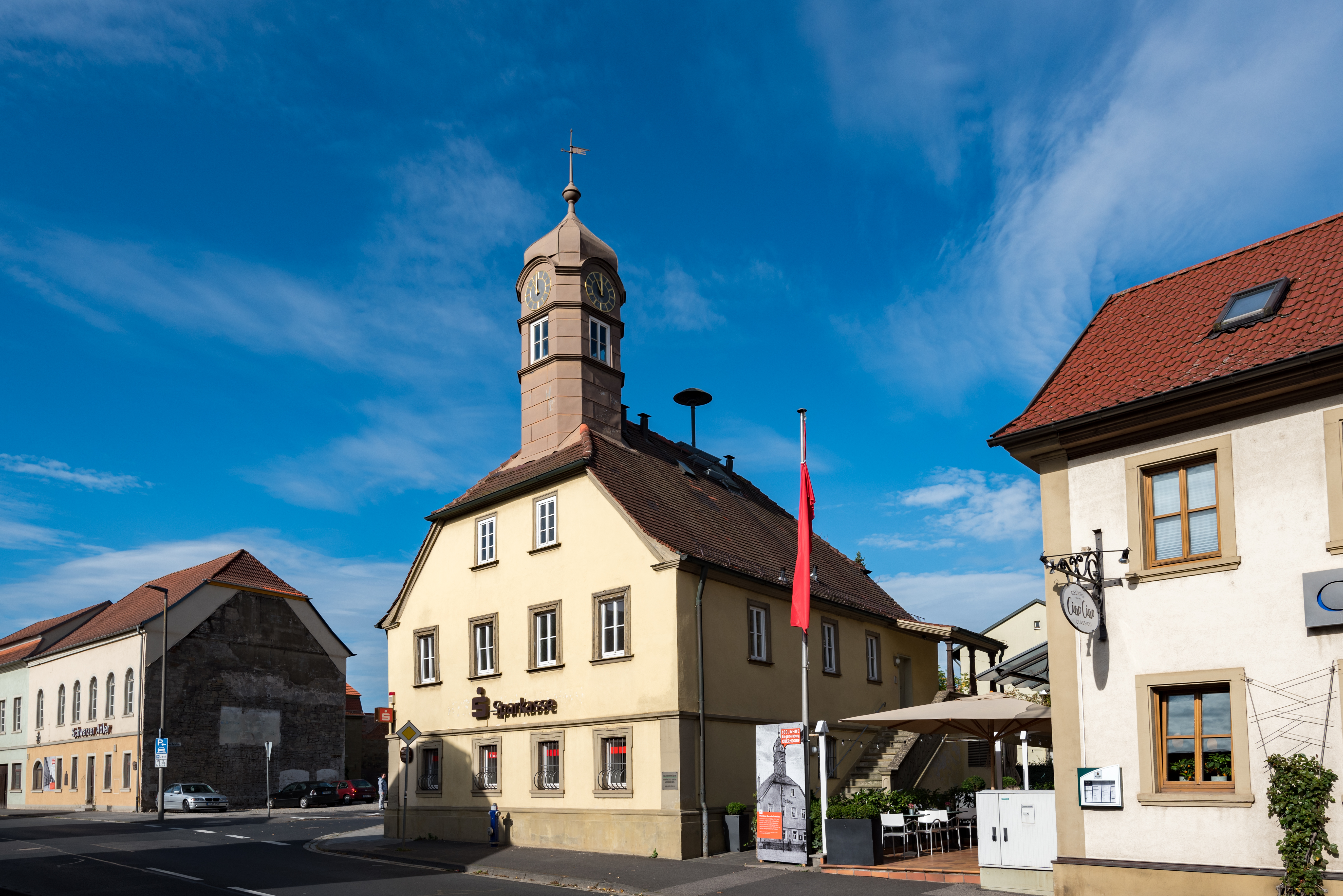 Schweinfurt, Oberndorf, Hauptstraße 30